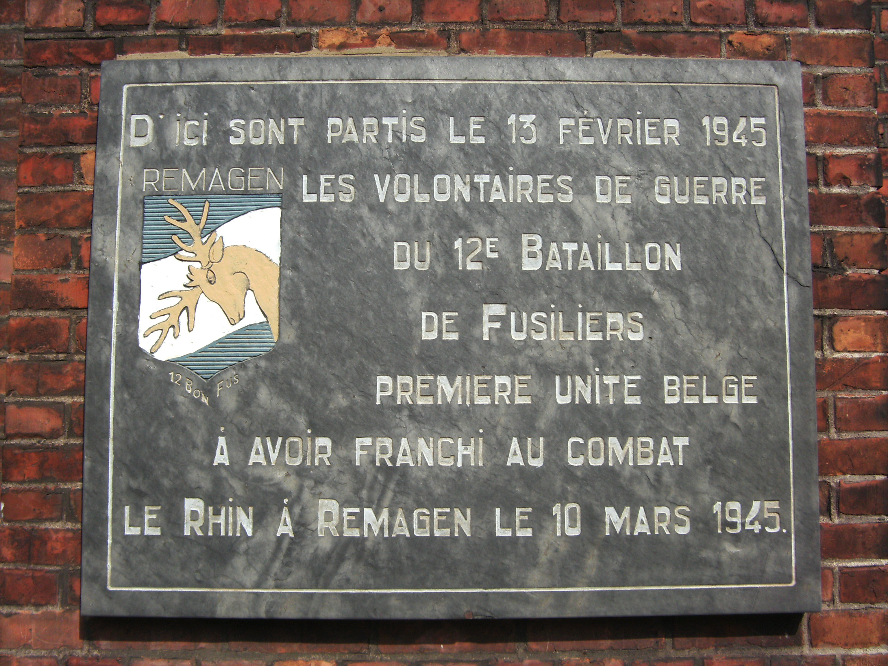 Plaque commémorative placée dans la cours de l'ancienne caserne d'infanterie "Caserne caporal Trésignies", avenue Général Michel à Charleroi (Belgique). Texte : "D'ici sont partis le 13 février 1945 les volontaires de guerre du 12e bataillon de fusiliersPremière unité belge à avoir franchi au combat le Rhin à Remagen le 10 mars 1945."